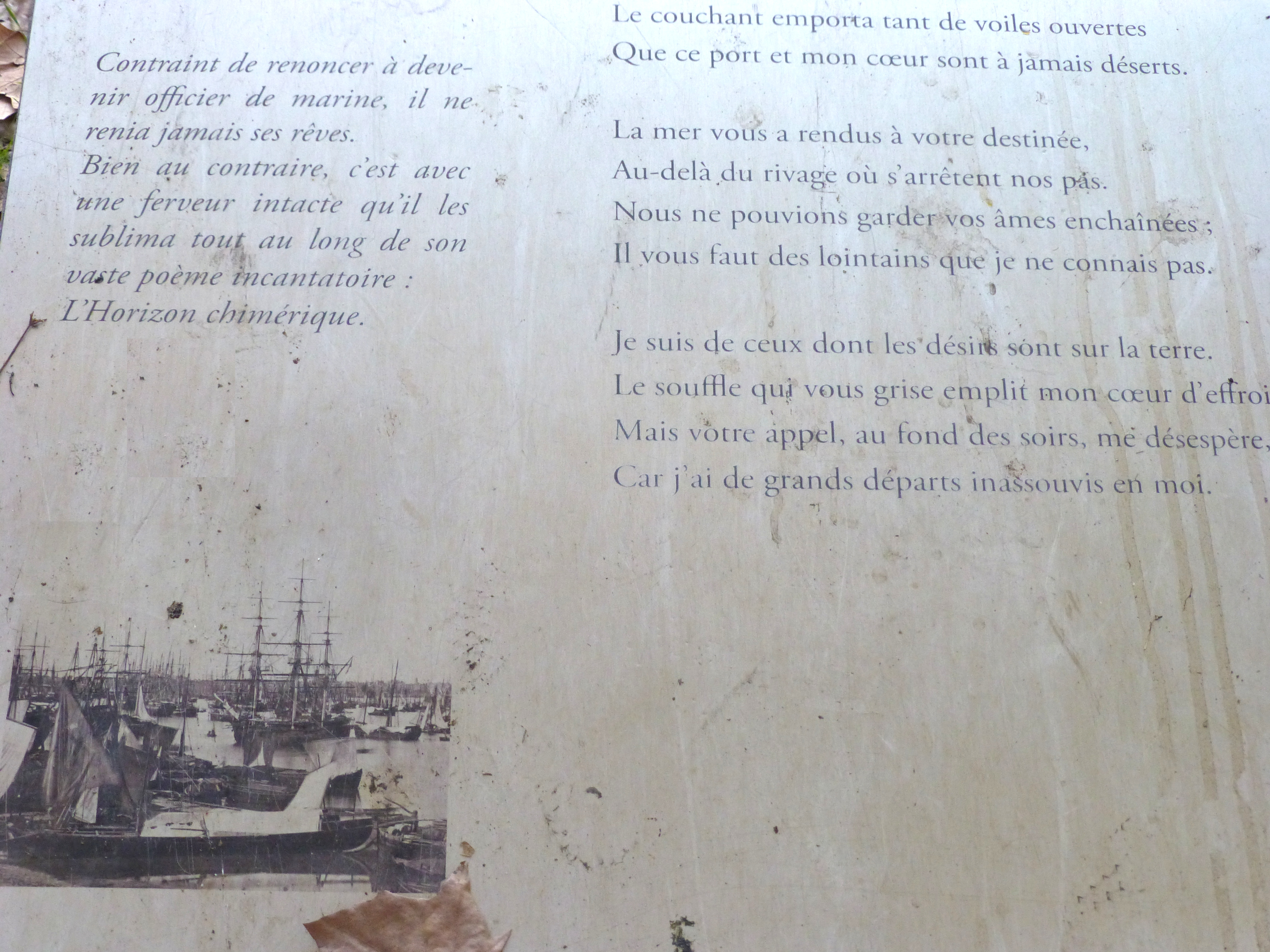 Plaque Jean de La Ville de Mirmont, quai rive droite Bordeaux ː citation de l'Horizon Chimérique (strophe I-5).